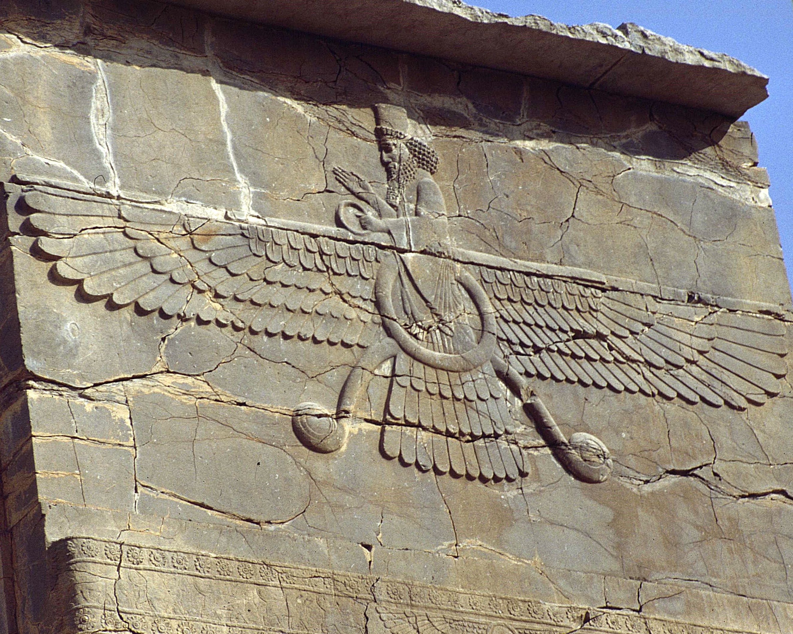 Ahura Mazda. Relief in Persepolis